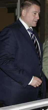 Георгий Боос